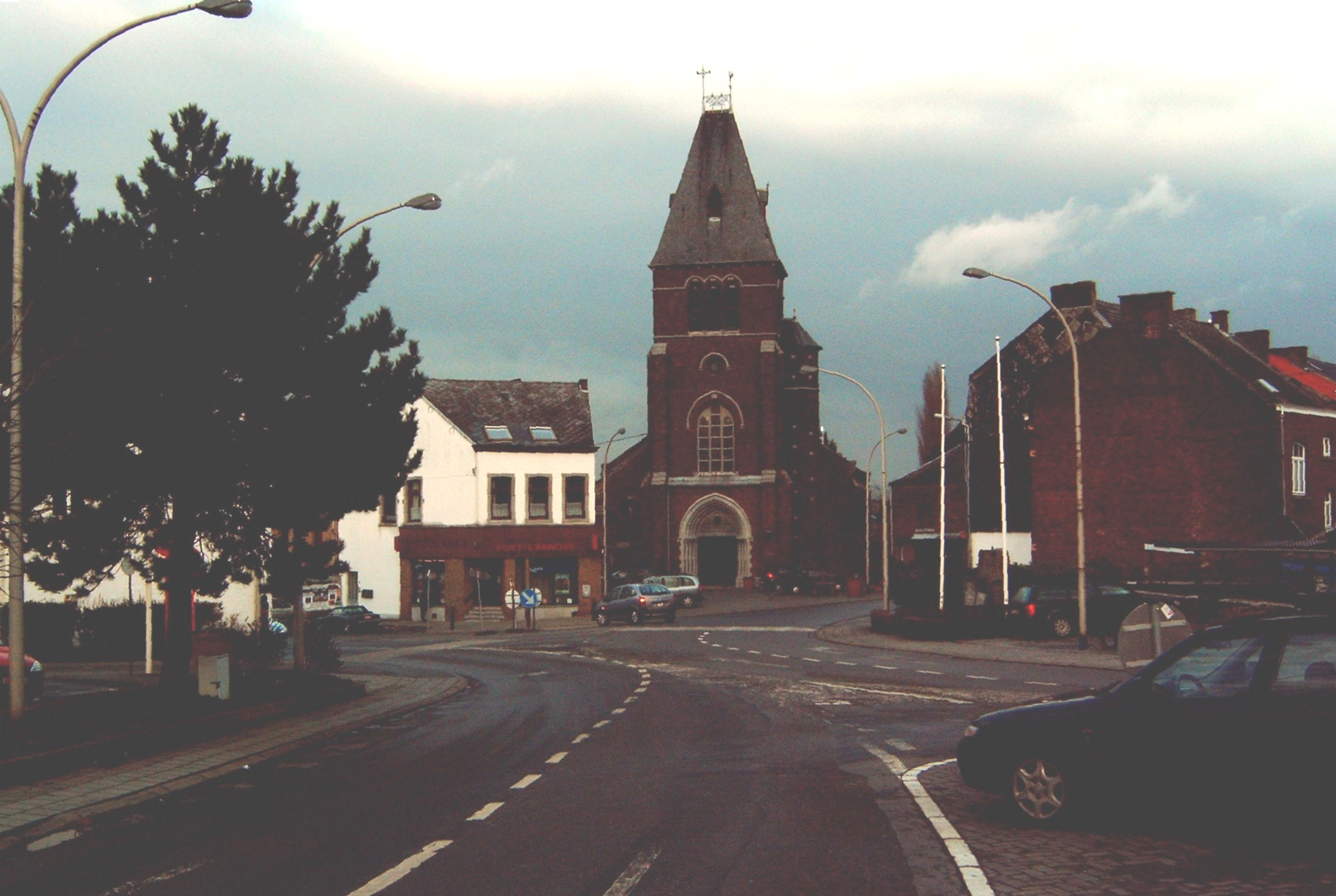 Het centrum van Belgrade, een deelgemeente van de Waalse hoofdstad Namen in België. Eigen opname van 10 feb. 2006.